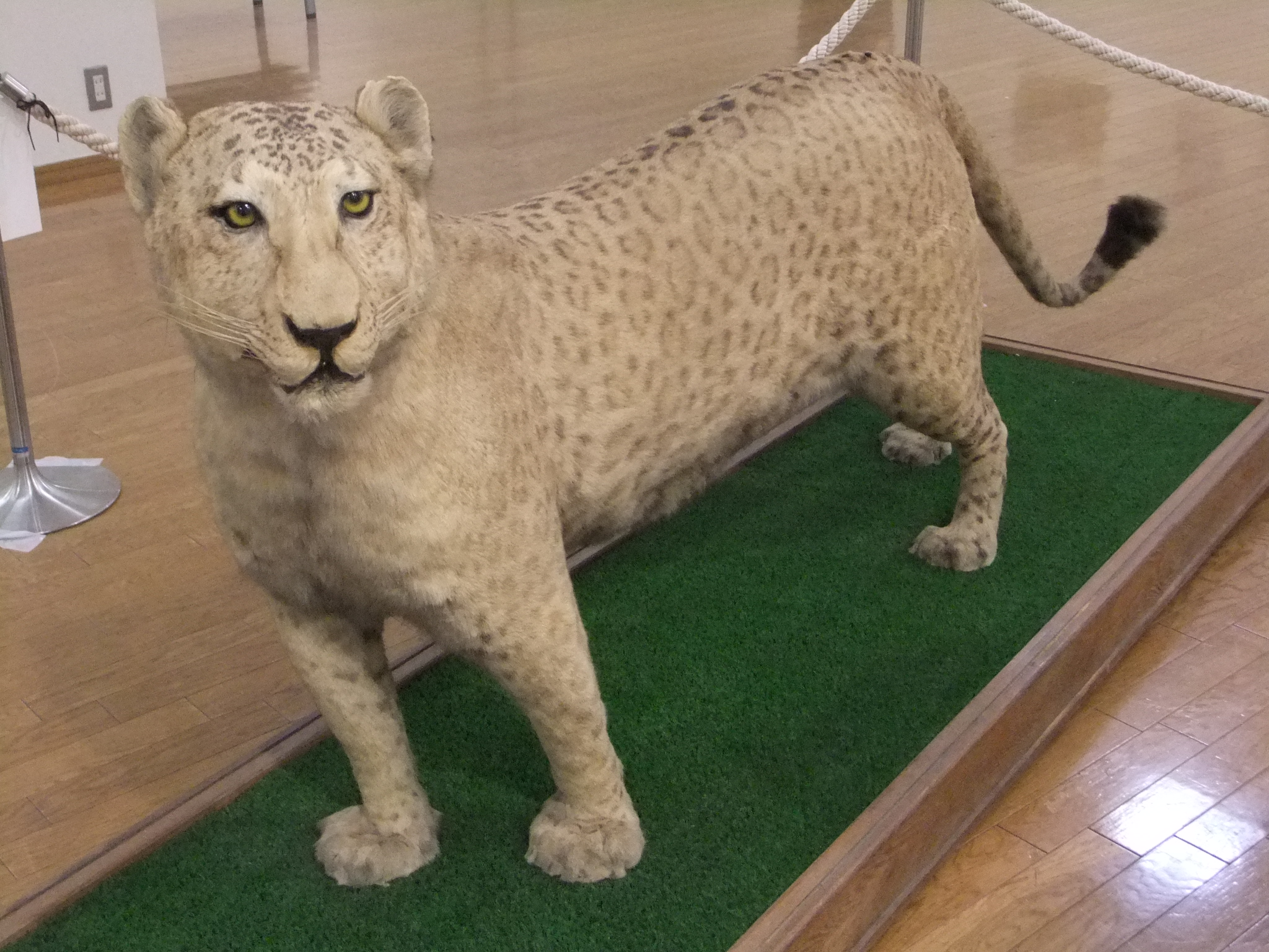 雌のレオポンの剥製(ポン子) 西宮ギャラリーでの特別展示